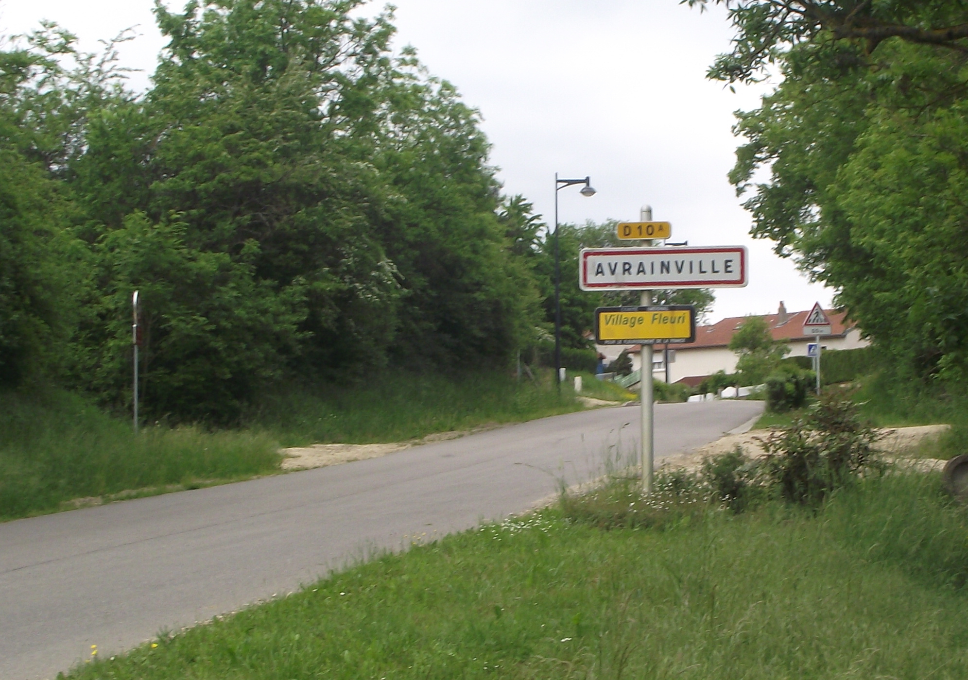 Entrée du Village de Avrainville